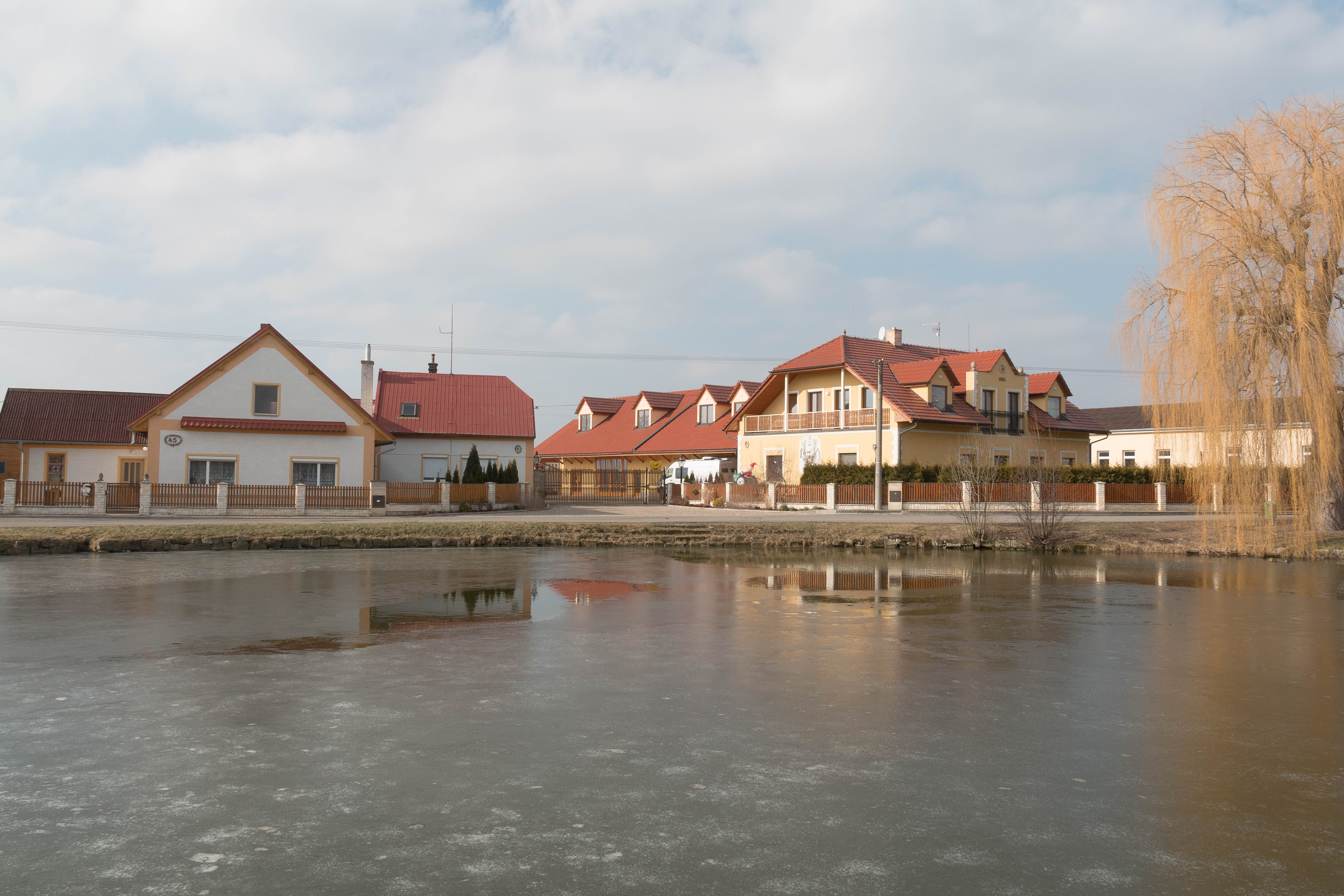 Vlčnov u Chrudimi návesní rybník